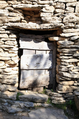 Door of a borie in Gordes